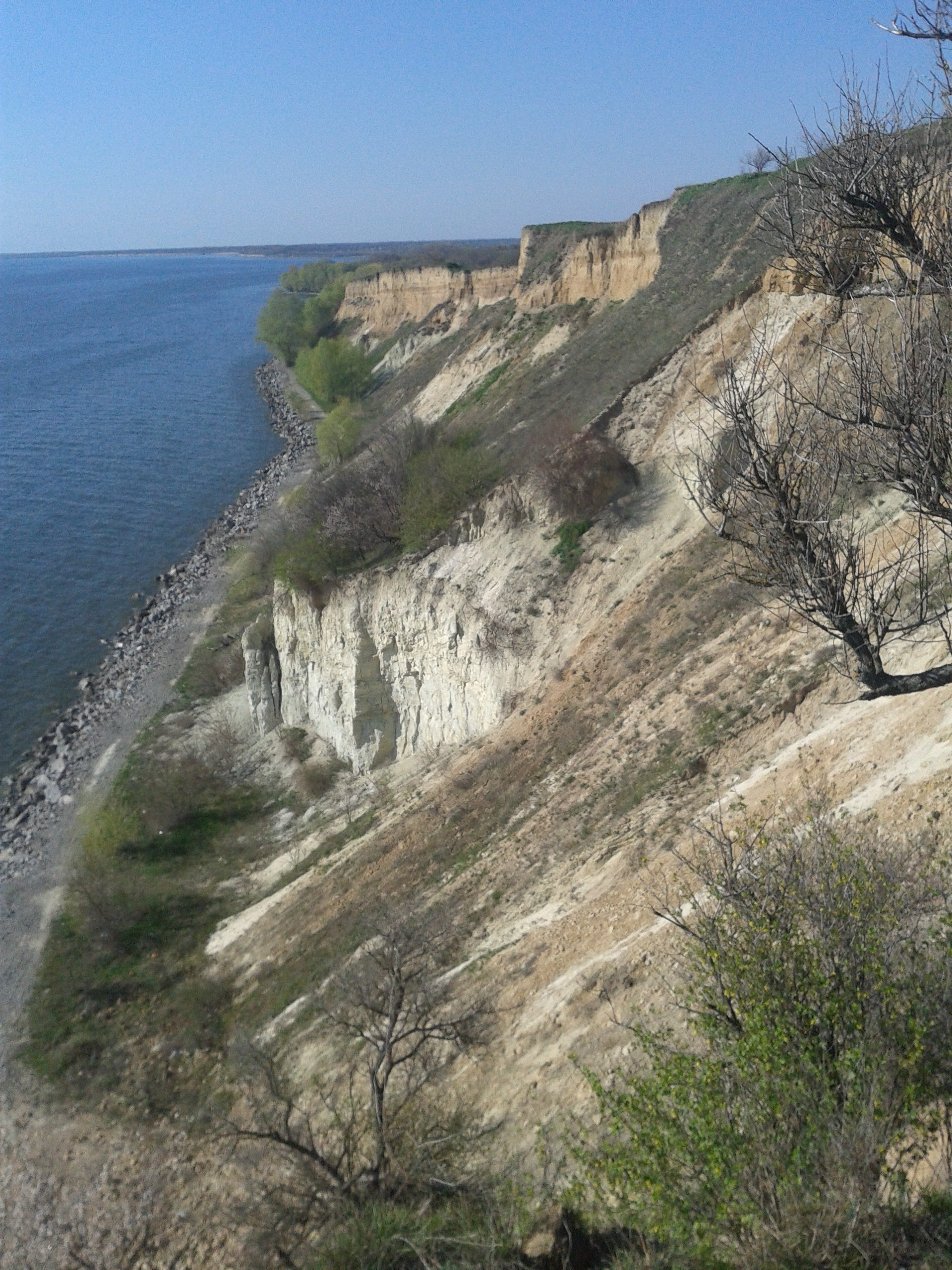 Ландшавтний заказник місцевого типа "Гора Пивиха"